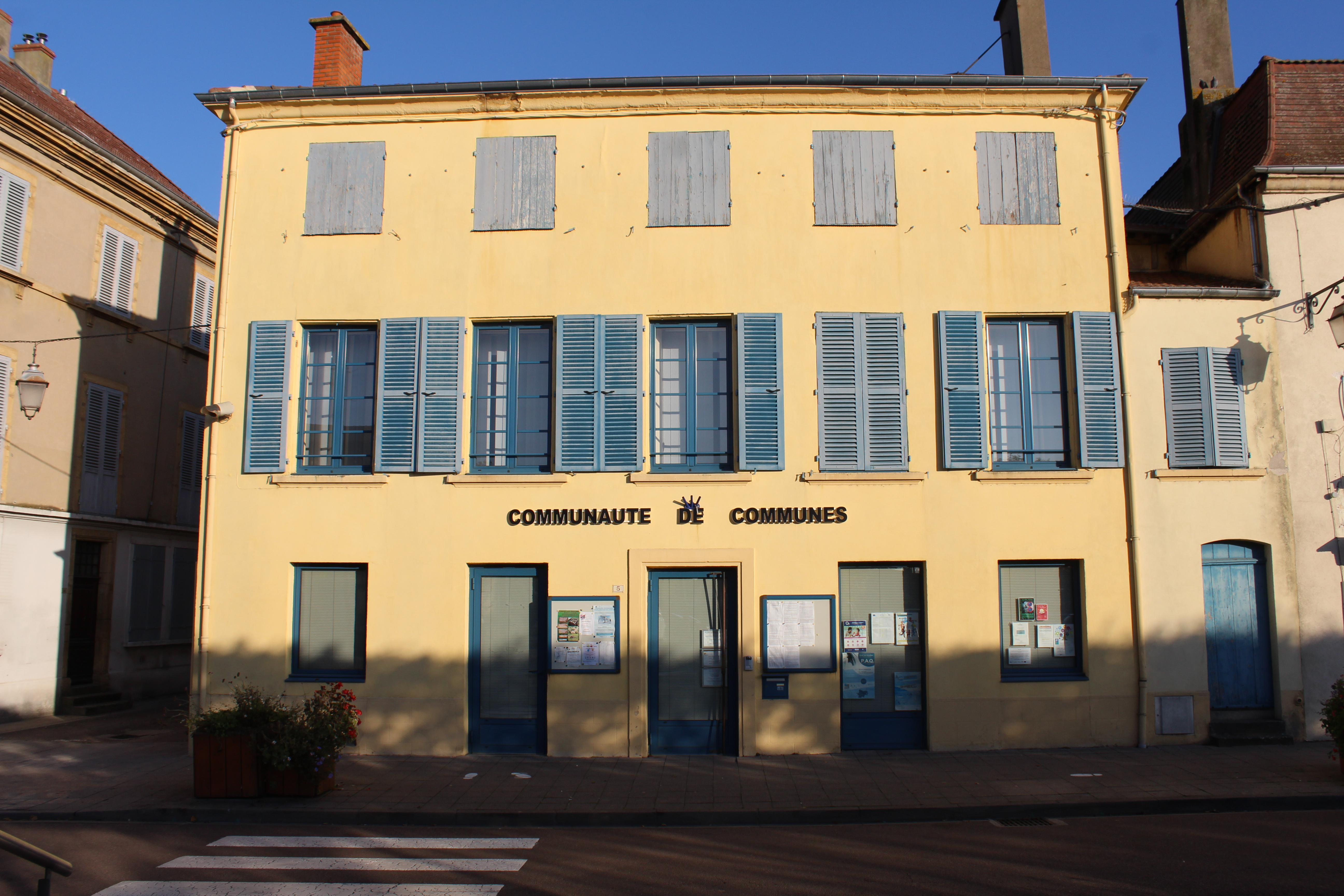 Siège de la Communauté de communes du Canton de Marcigny.